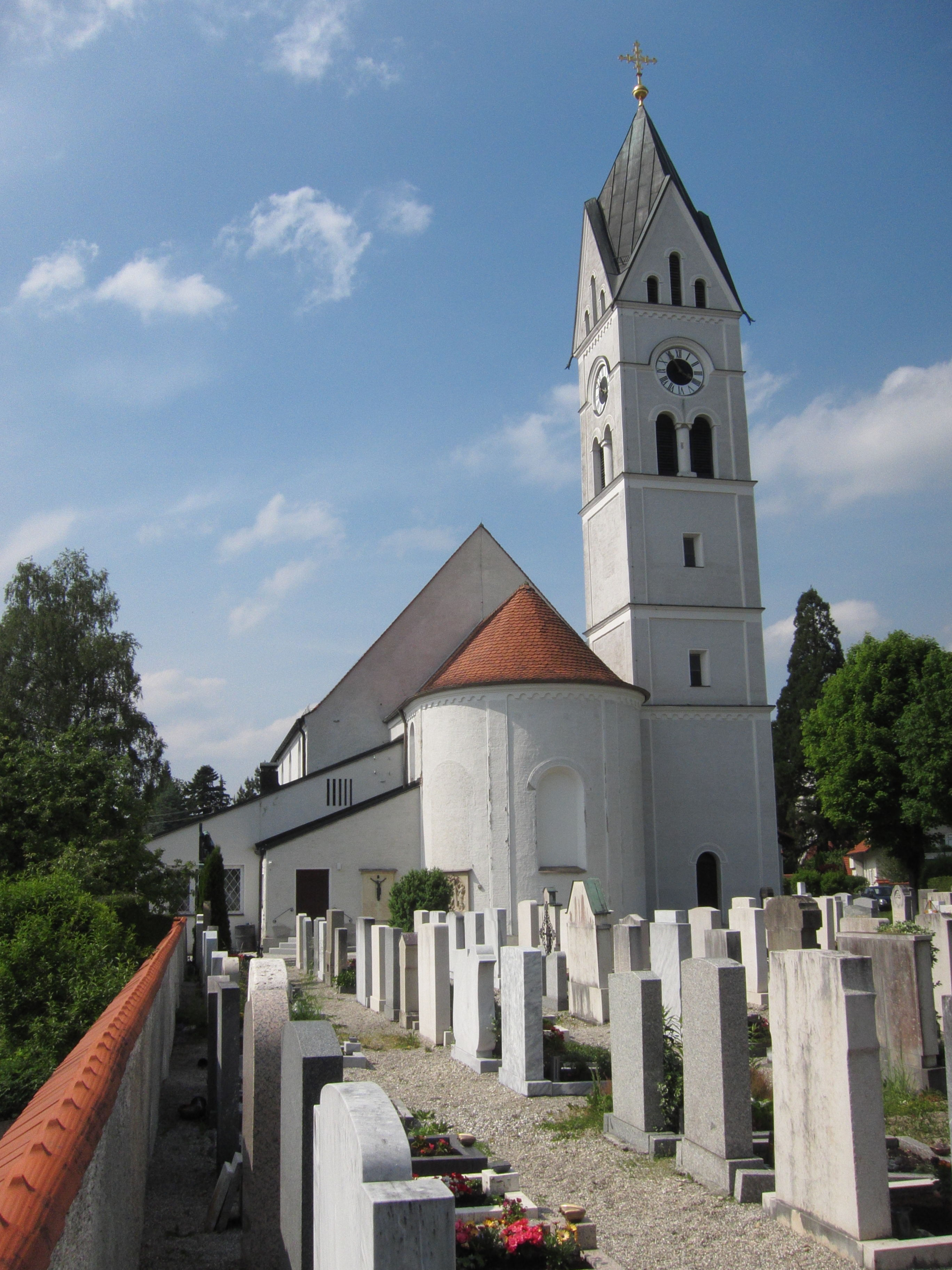 Kirchenweg 6; katholische Pfarrkirche St. Joseph, neuromanisch, 1898/99, erneuert 1952/53.